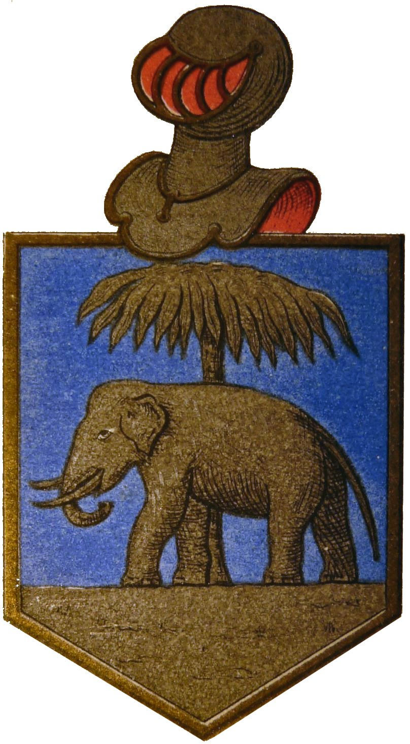 Wappen der Familie Lefort, Genf